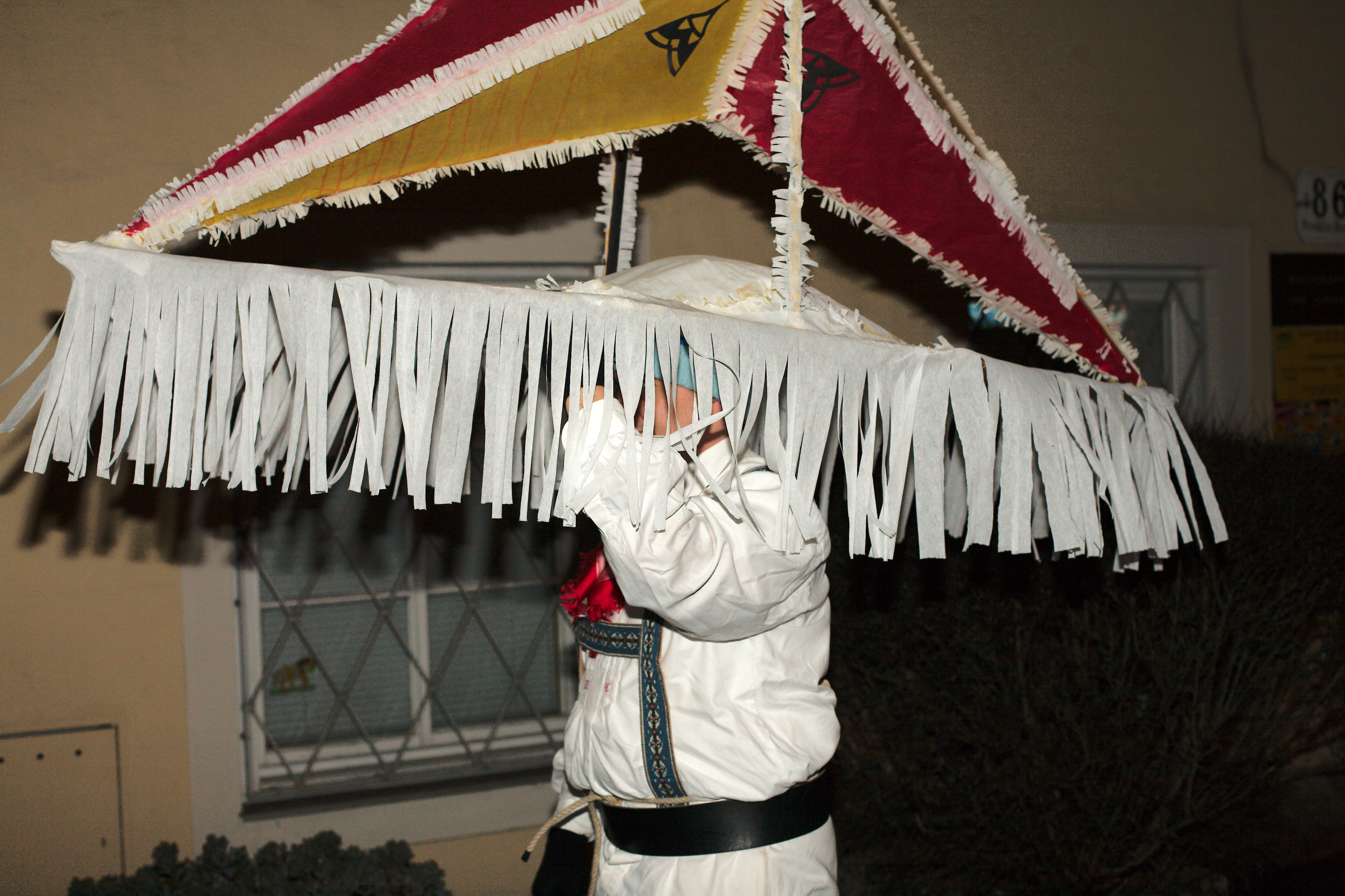 Glöckler in Salzburg, Austria 2013